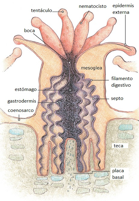 Anatomía de un pólipo de coral. Adaptación al español del archivo Coral polyp.jpg de Commons